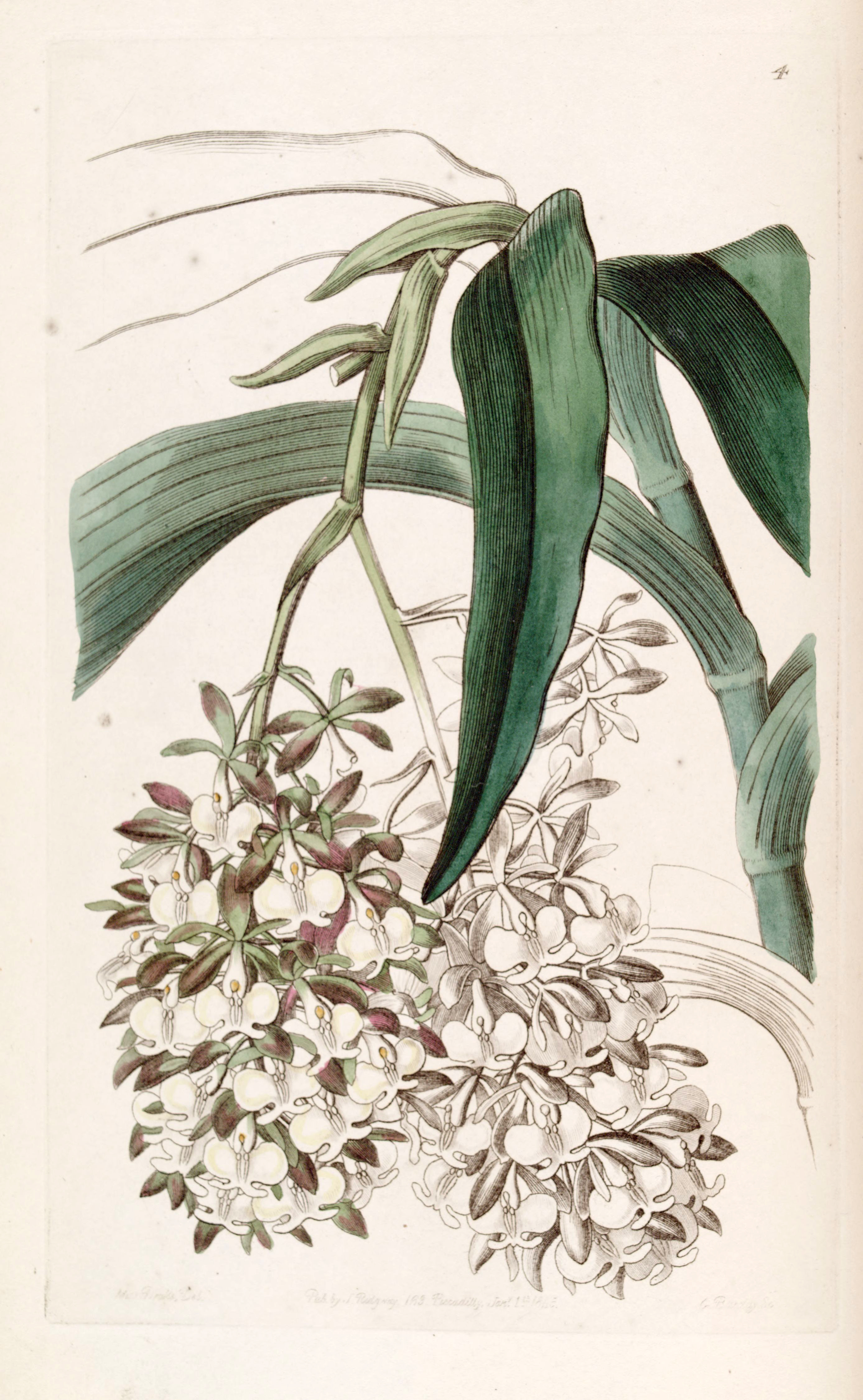 Epidendrum dipus